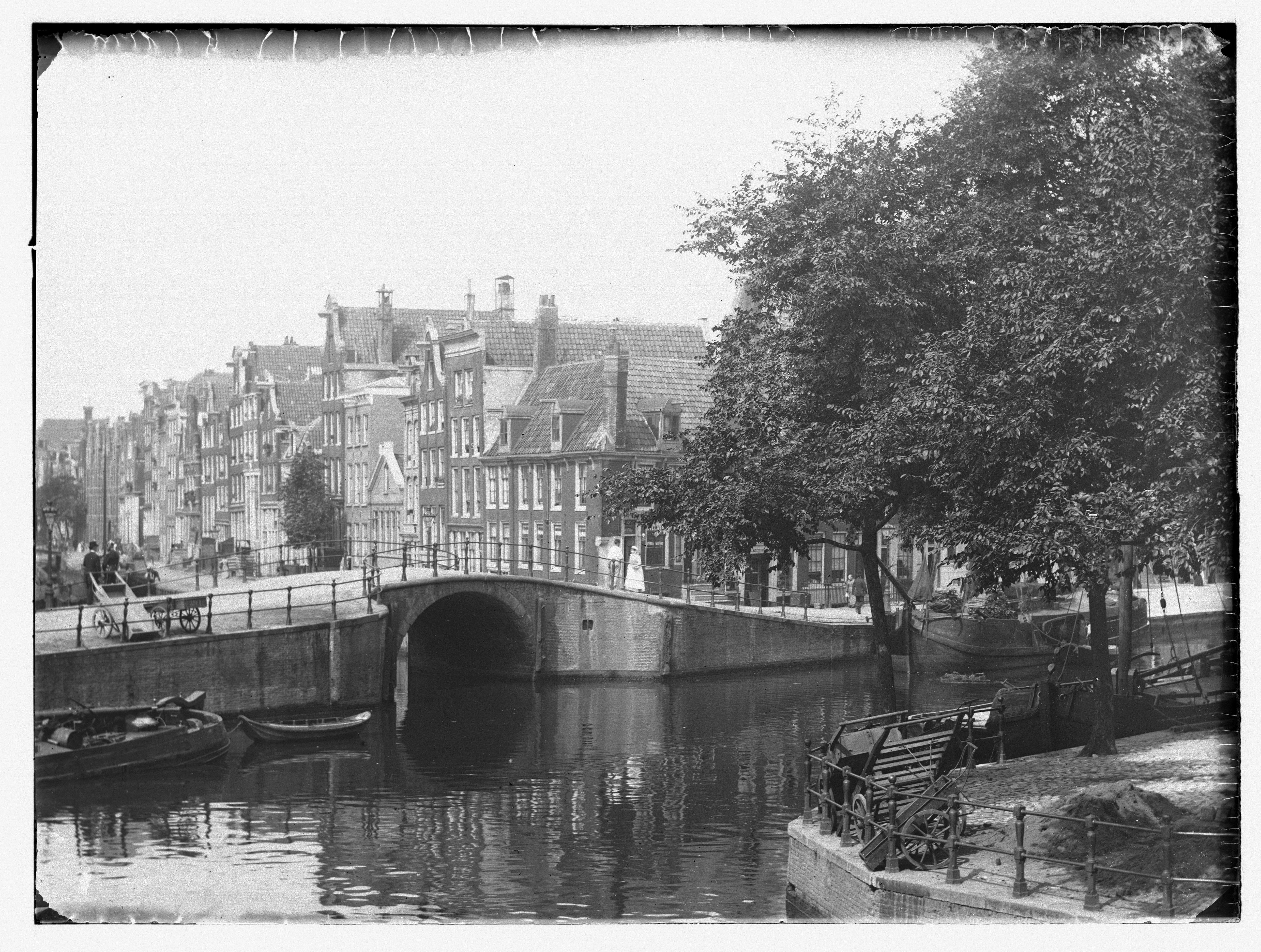 Beschrijving Brouwersgracht 107 (rechts) Hoek Lindengracht nrs.2-4-6 enz. (v.r.n.l.)``, gezien in oostelijke richting vanaf Korte Prinsengracht, de brug is gesloopt vanwege de demping van de Lindengracht rond 1895 Documenttype foto Vervaardiger Olie``, Jacob (1834-1905) Collectie Collectie Jacob Olie Jbz. Datering 1891 Geografische naam Brouwersgracht Inventarissen Afbeeldingsbestand 010019000236 Generated with Dememorixer